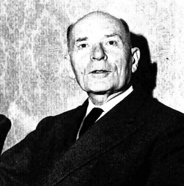 Italian General Cesare Amè